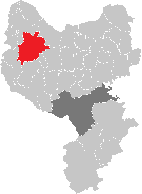 Bezirk Amstetten